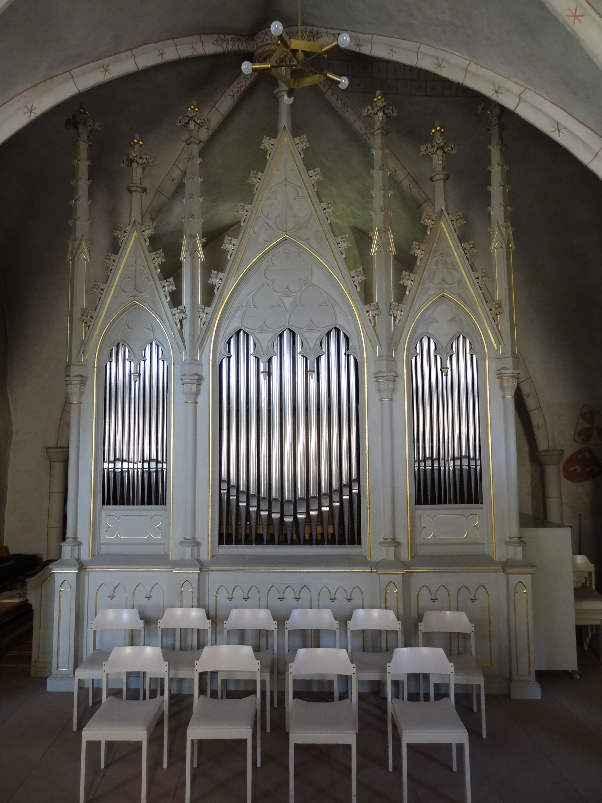 Evangelische Kirche Großen-Buseck